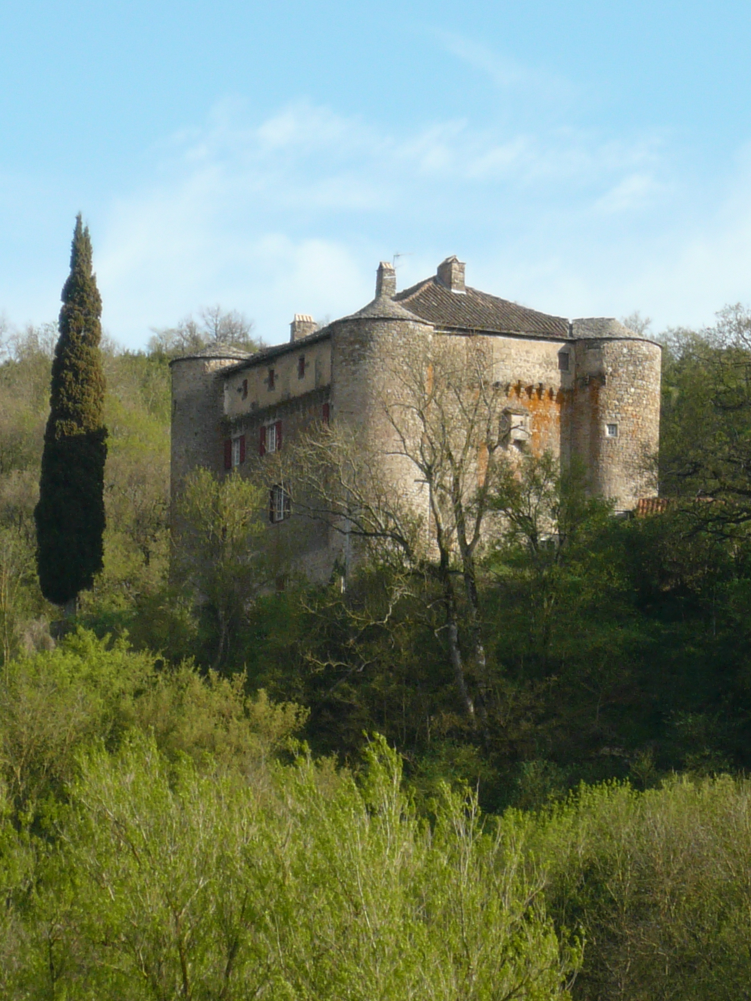 Château du XIVe siècle situé dans la commune de "Versols et Lapeyre" département de l'Aveyron.